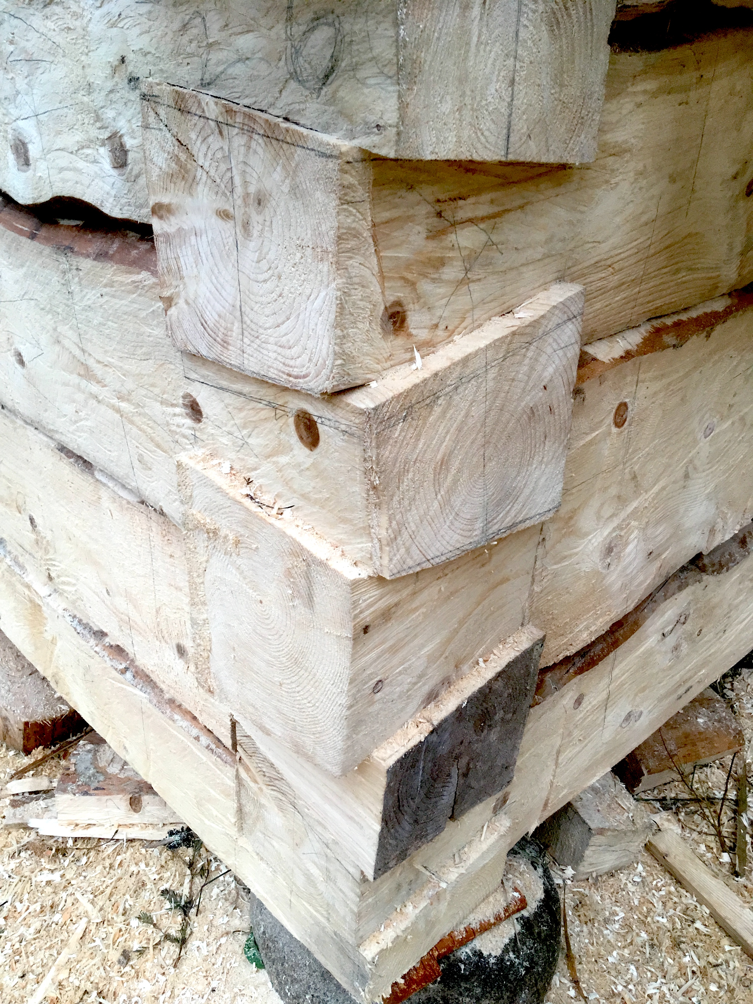 Kalasabatapp